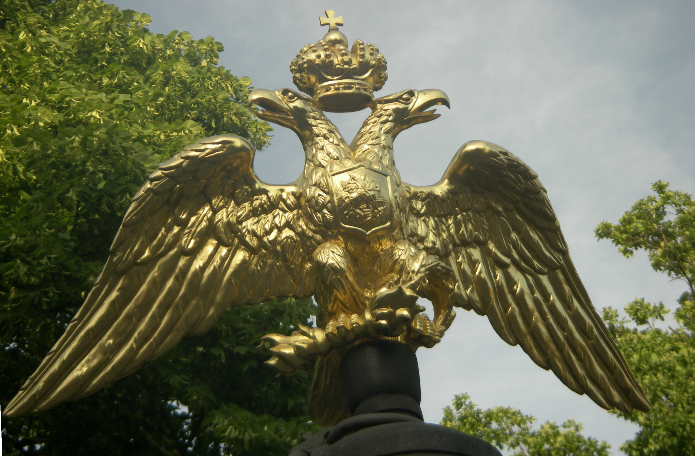 Птичка на воротах Спасо-Преображенского собора. (Санкт-Петербург). See Image:Птичка (original).jpg for original.